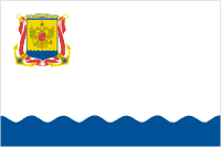 Флаг Новороссийска, Россия.